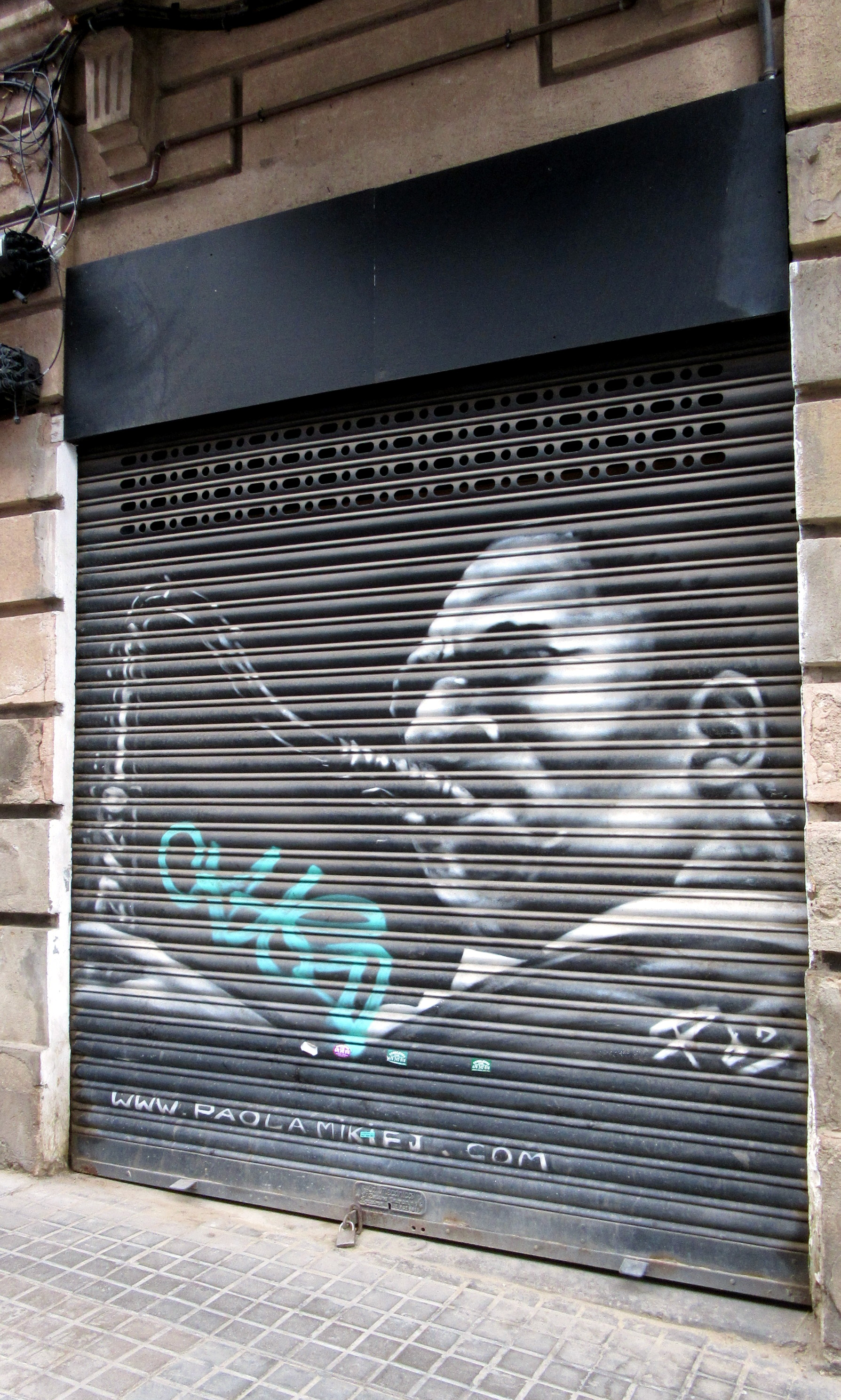 Graffiti a la Casa Luthier, Atelier del Vent. Pintura de Paola Mikiej